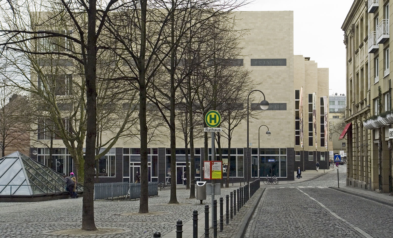 Köln, Wallraff-Richartz-Museum